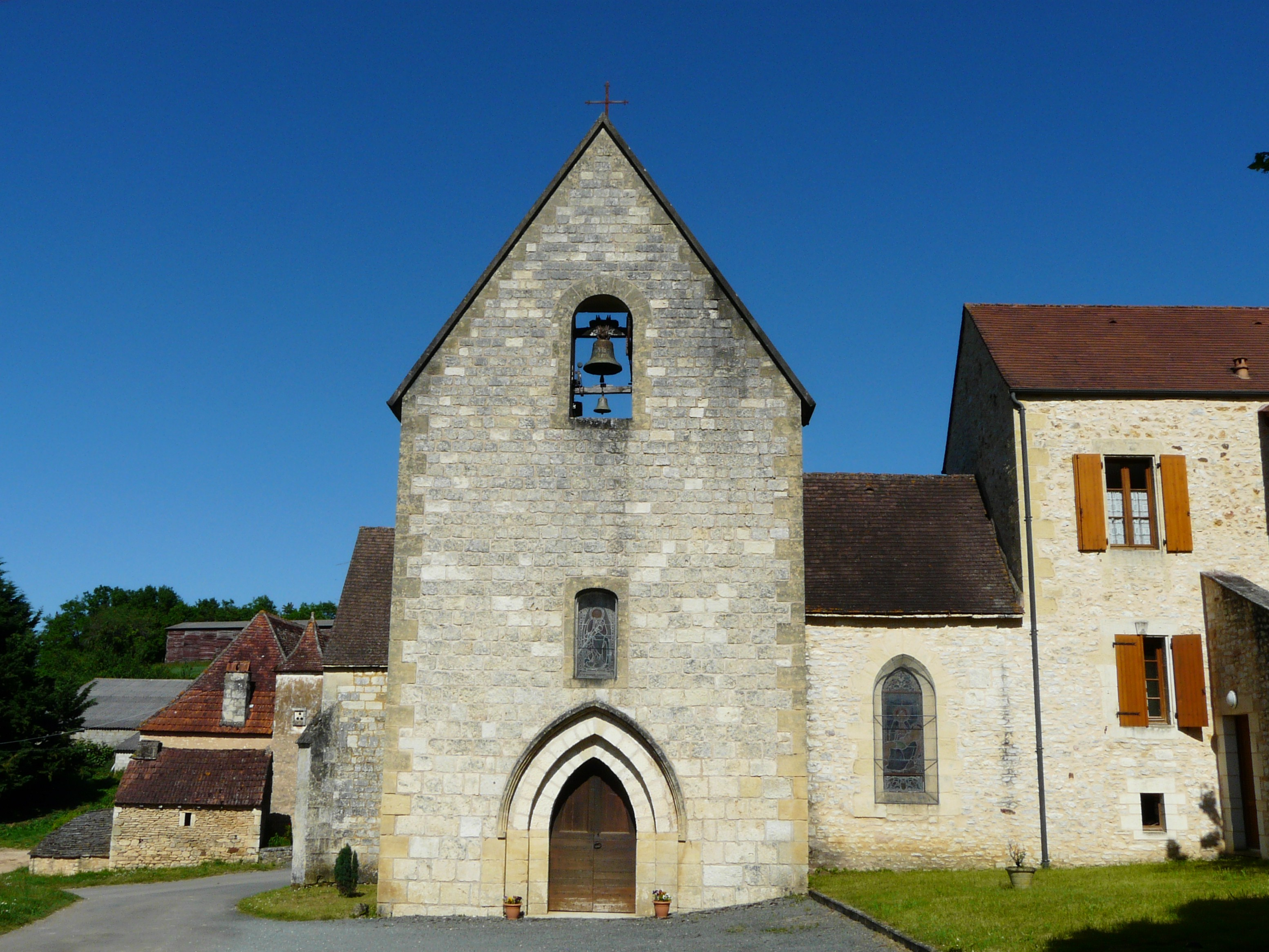 La façade occidentale de l'église Saint-Pierre-ès-Liens, Veyrines-de-Domme, Dordogne, France.